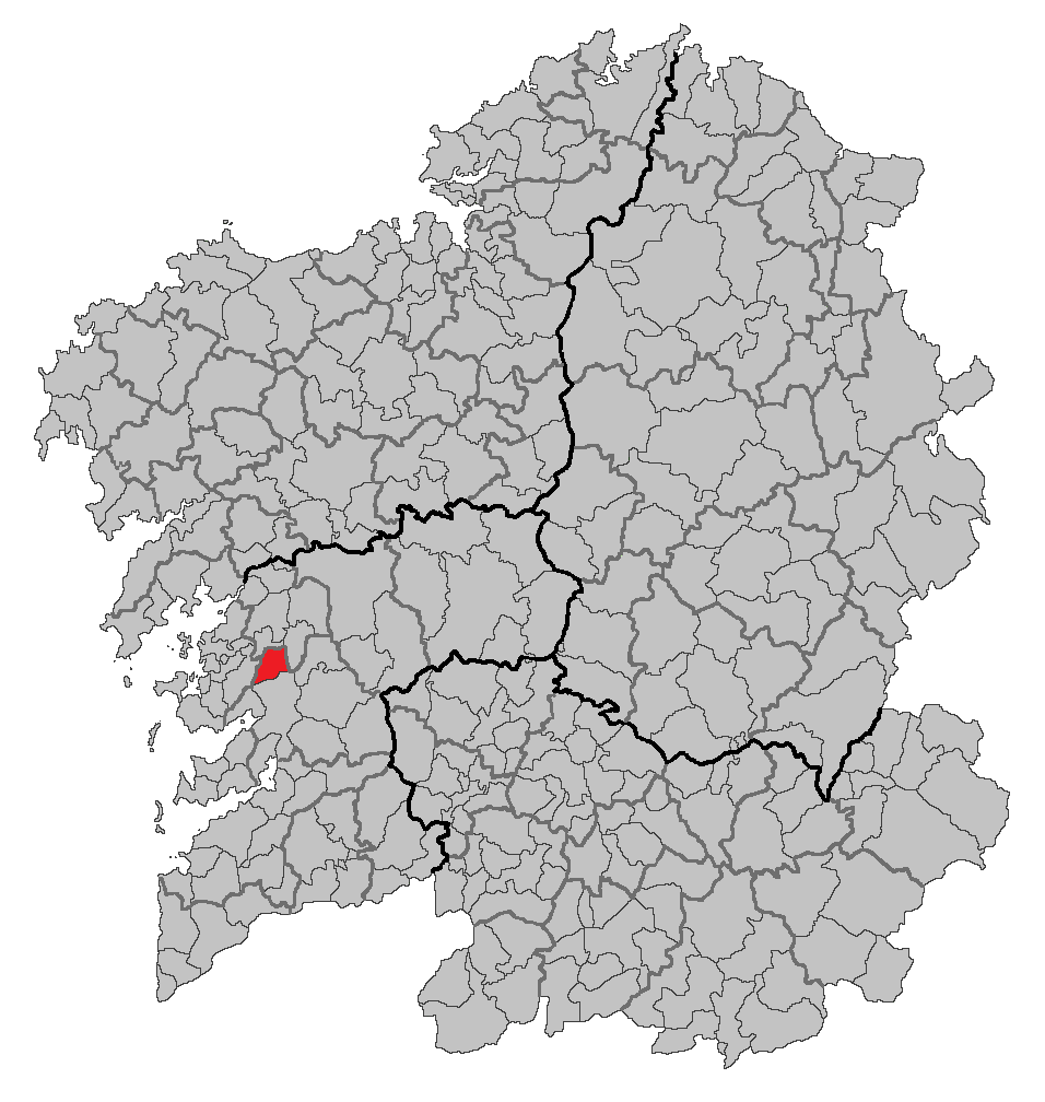 Mapa coa localización do concello de Barro.